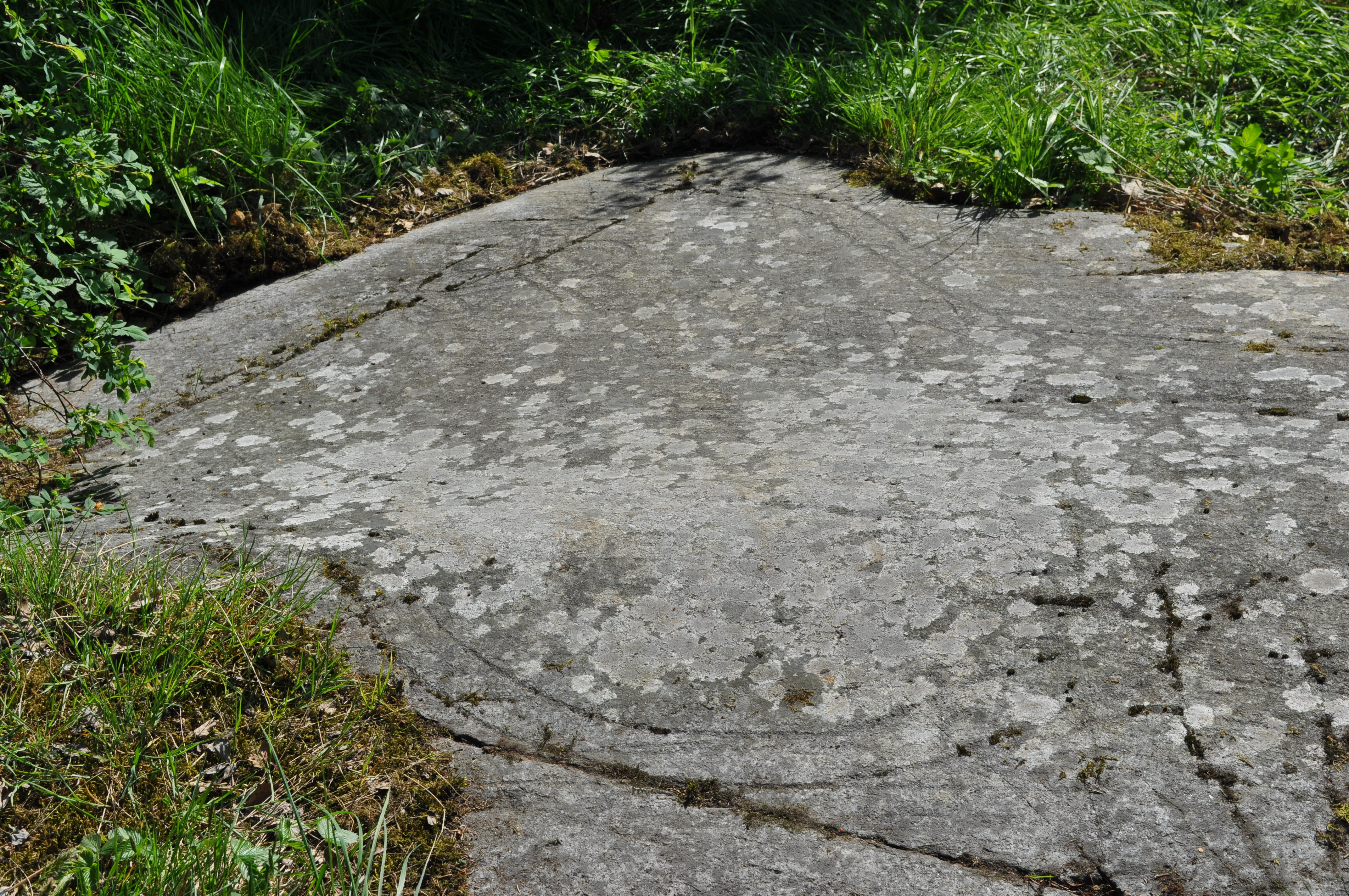 Runhällen U 81 vid Sundby i Stockholms kommun, sedd uppochned. Motljuset ökar kontrasten och framhäver de grunda linjerna.